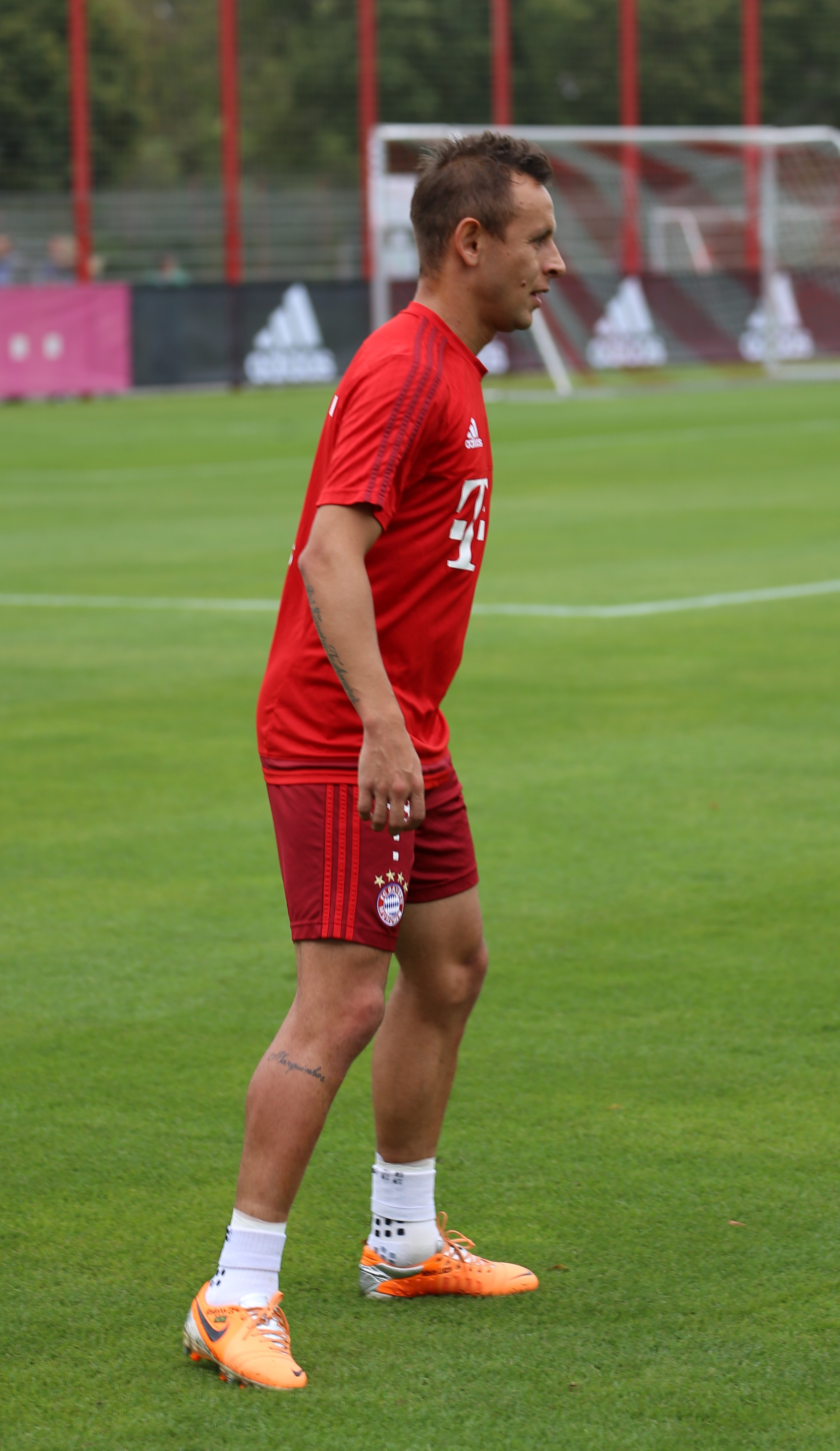 Rafinha beim Training auf dem Gelände des FC Bayern München